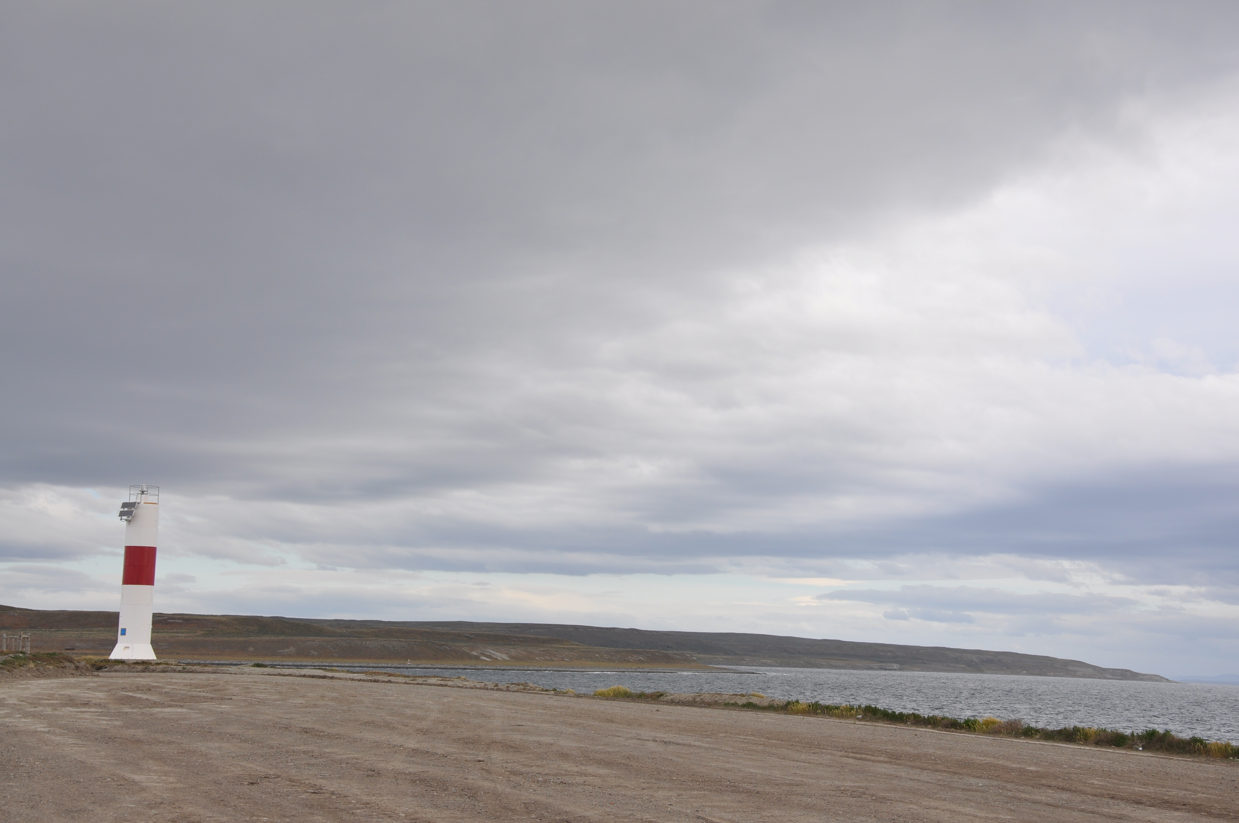 Phare Bahía Porvenir situé en Terre de Feu au Chili